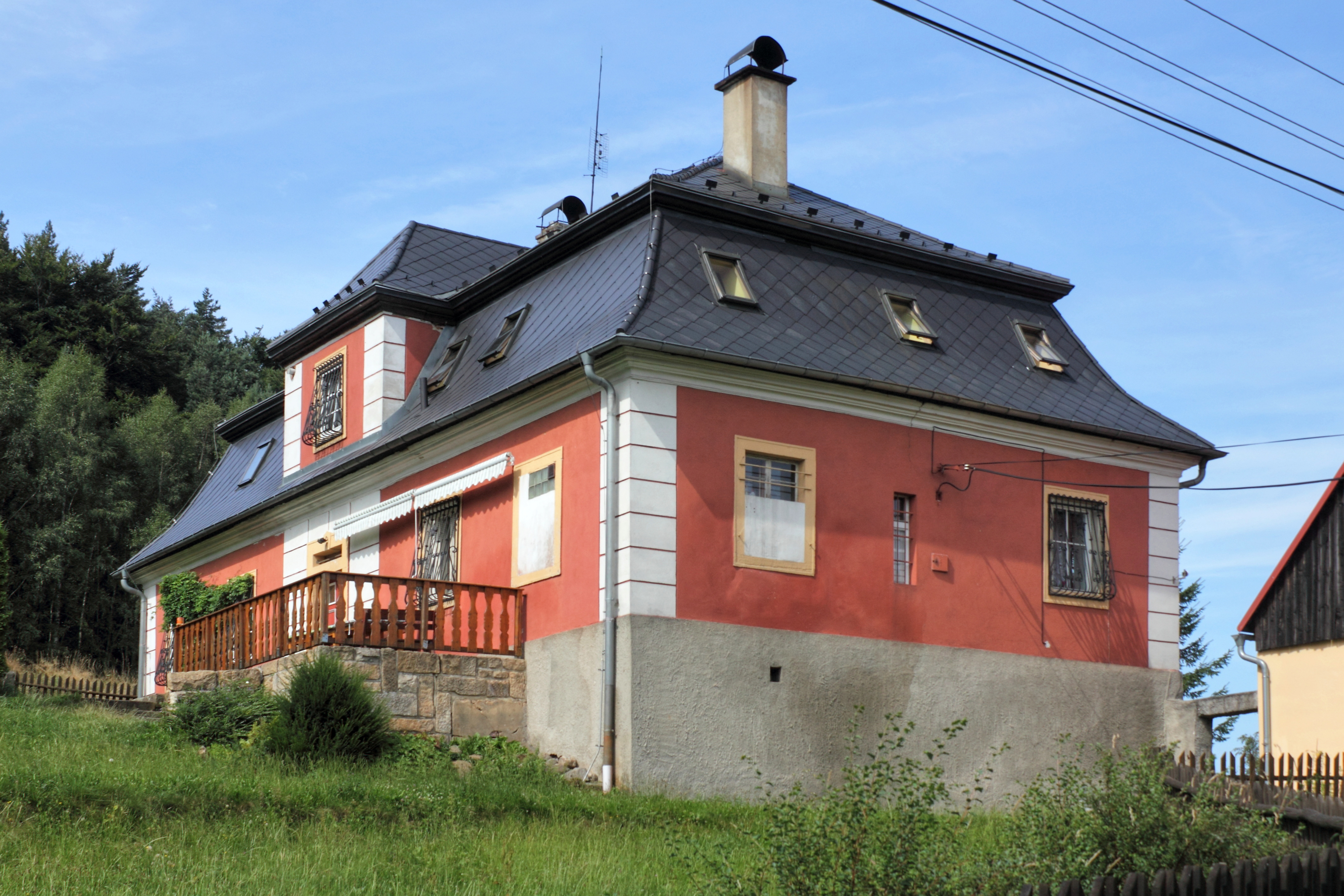 Fara v Jítravě